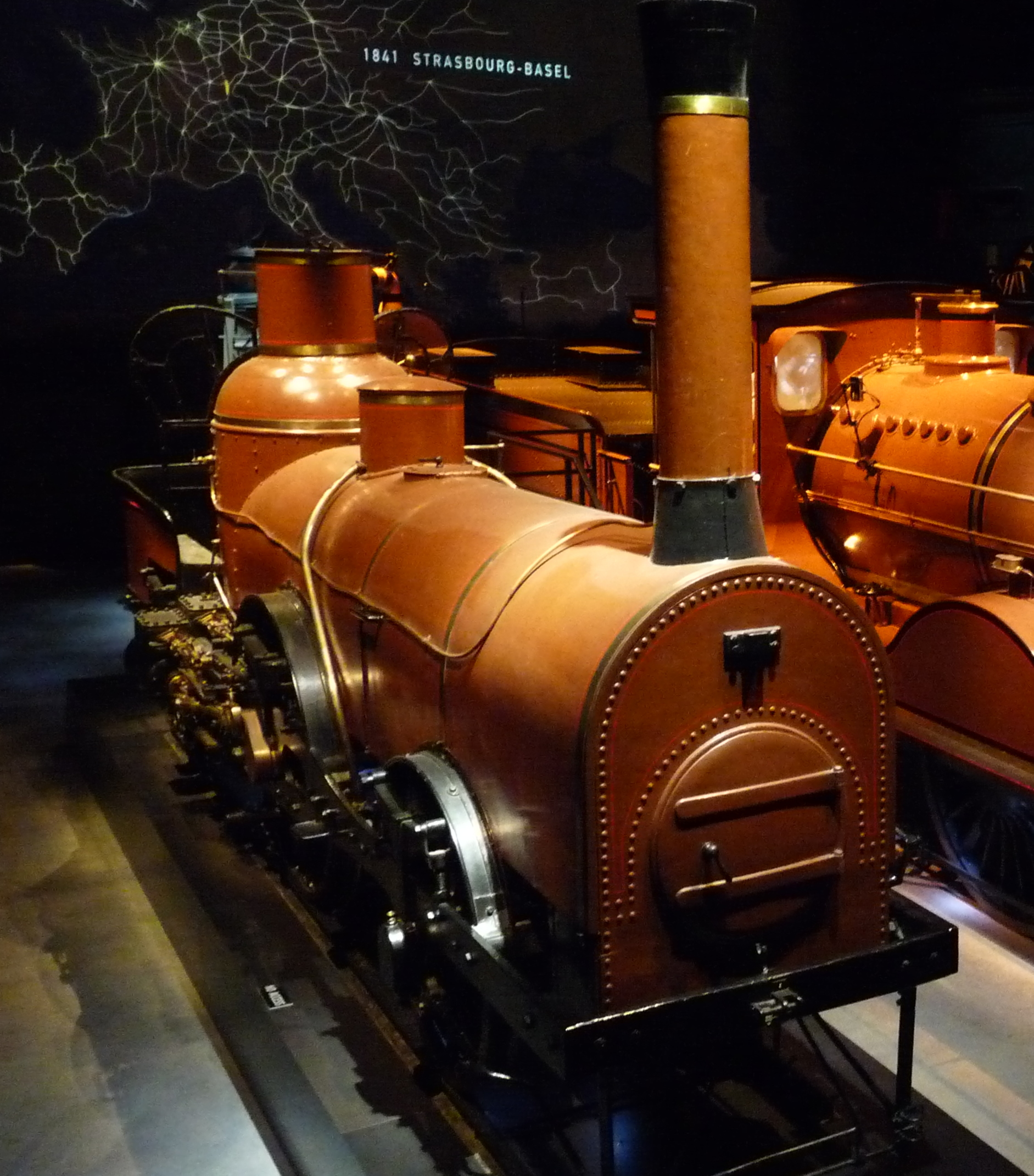 Oude Belgische stoomlocomotieven in Train World